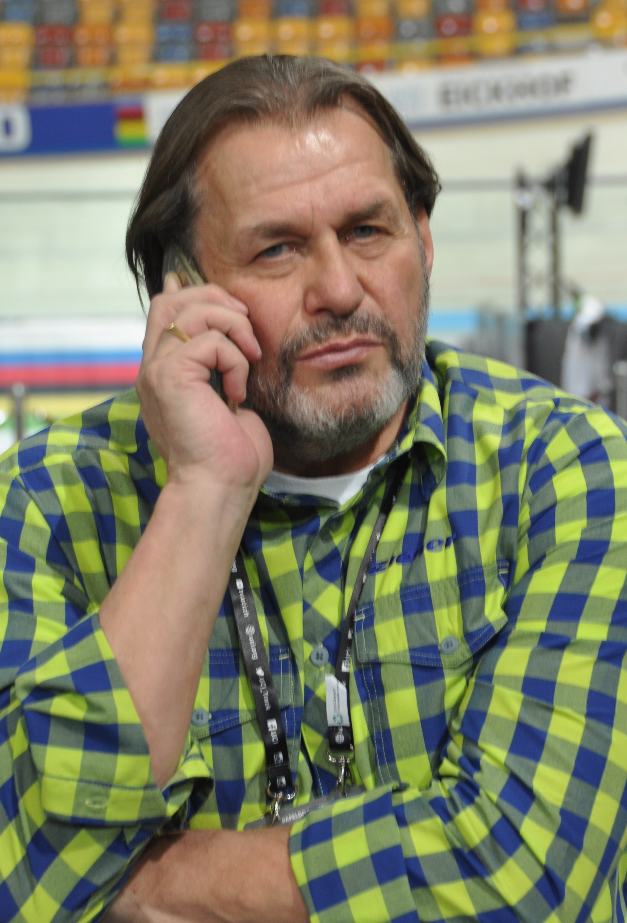 Michael Hübner, ehemaliger dt. Radsportler